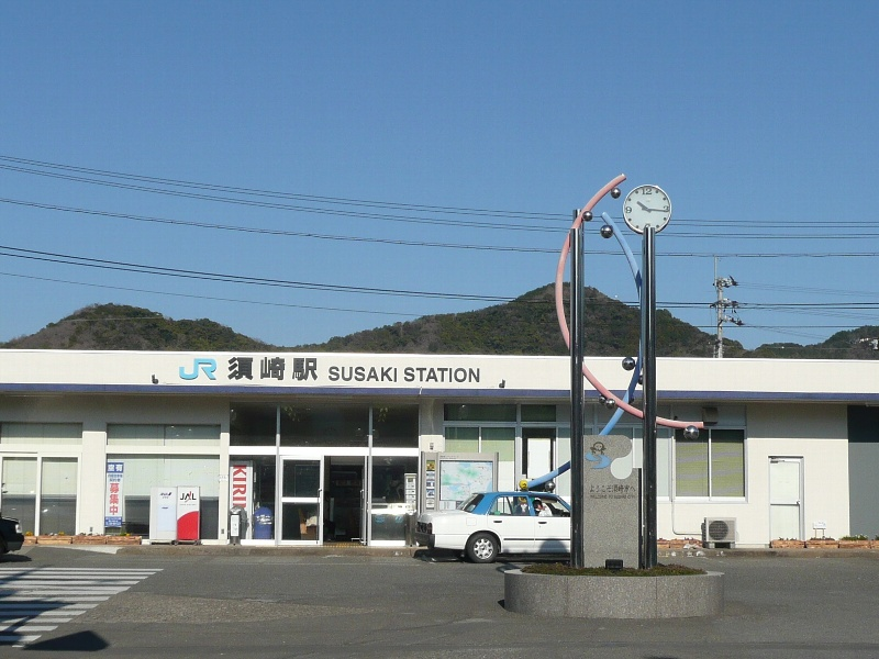 Susaki station